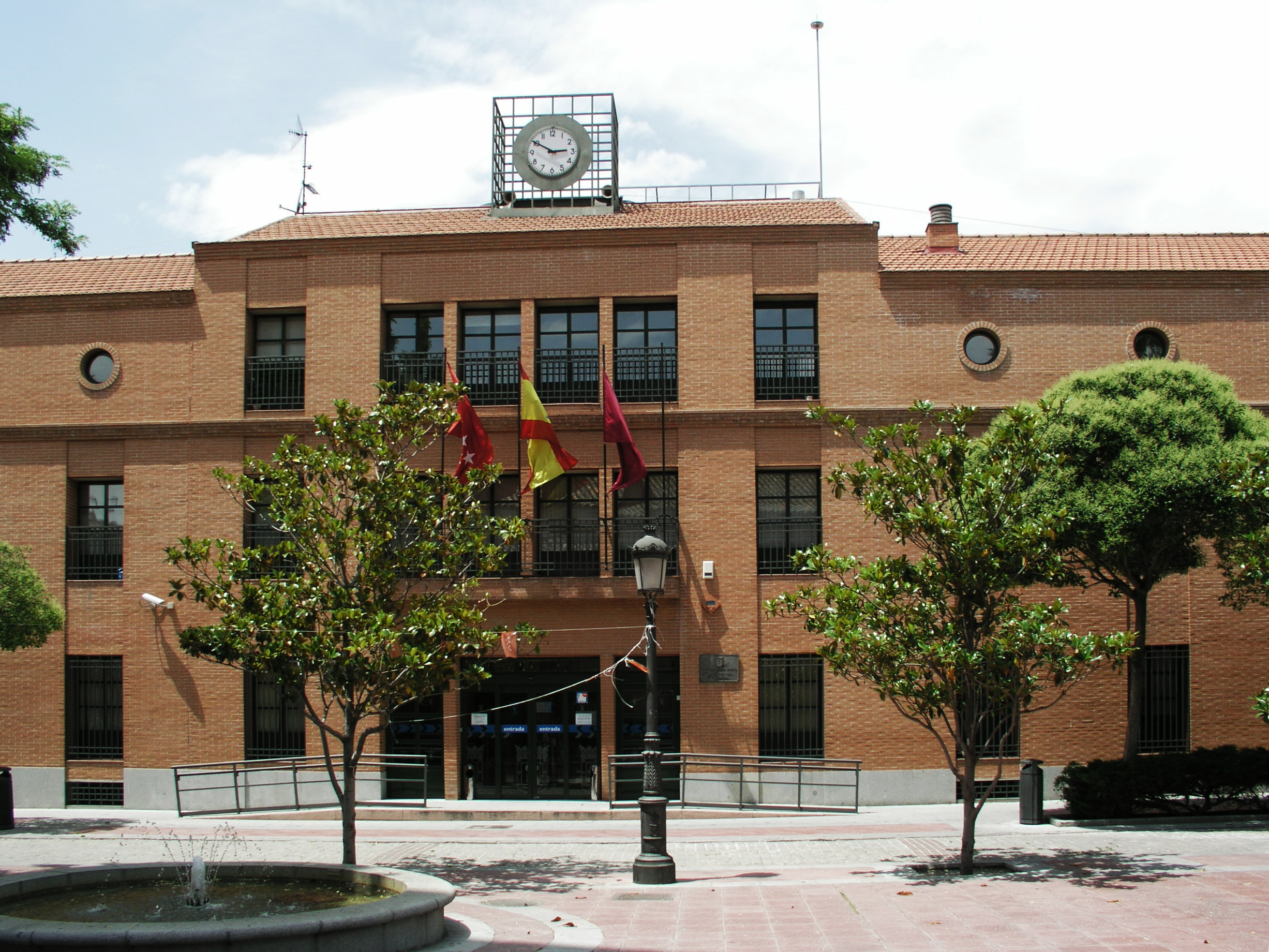 Barajas (pueblo), Madrid, Spain. Ayuntamiento.